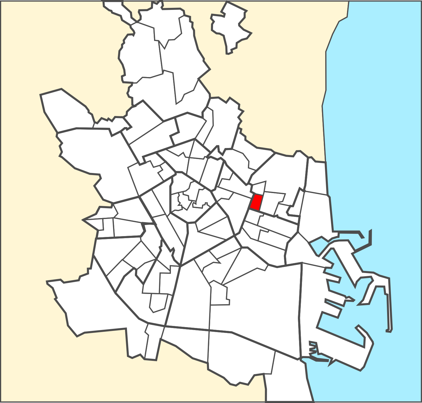 Localització del barri dins de la ciutat de València.